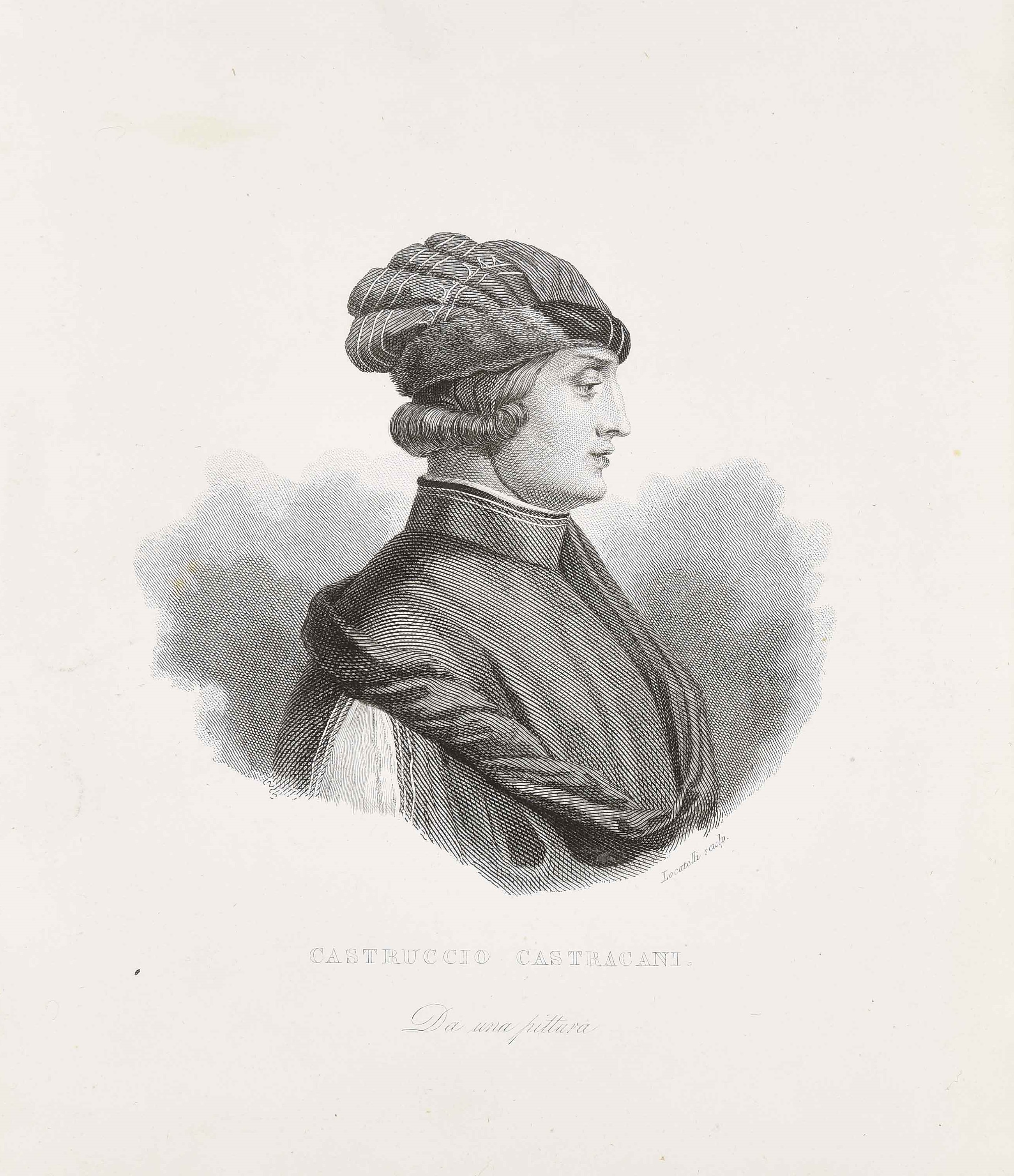 Calcografia in Iconografia italiana degli uomini e delle donne celebri: dall'epoca del risorgimento delle scienze e delle arti fino ai nostri giorni, Milano, Antonio Locatelli, 1837.